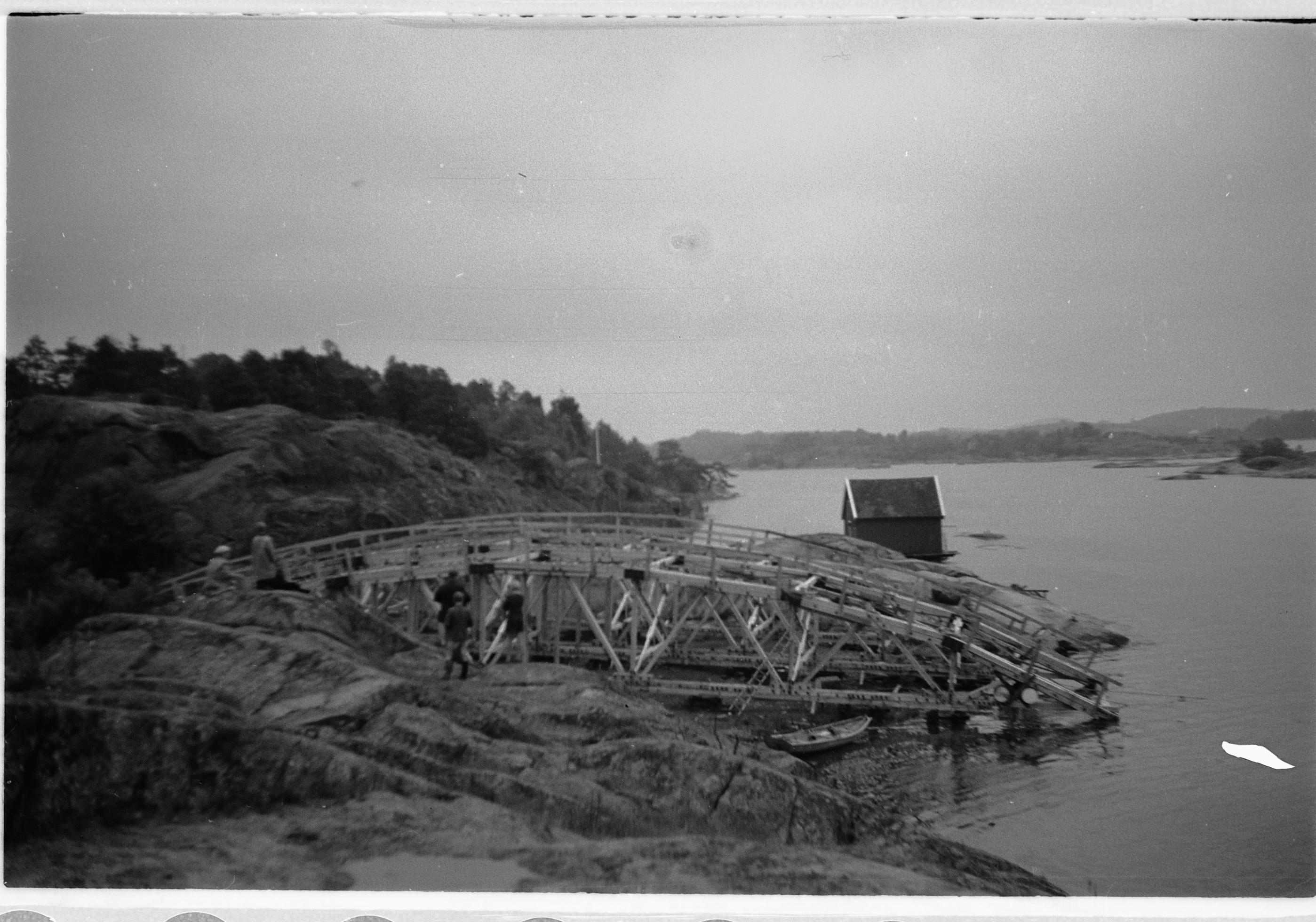 Røssesundbrua. Bilde fra Røssesund, Tjøme. Fotografert av Håkon Prestkværn.